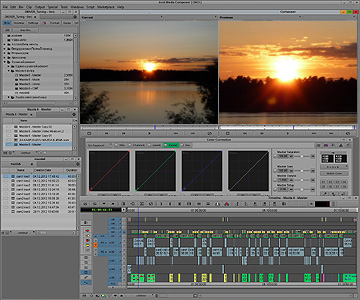 Окно программы Avid Media Composer